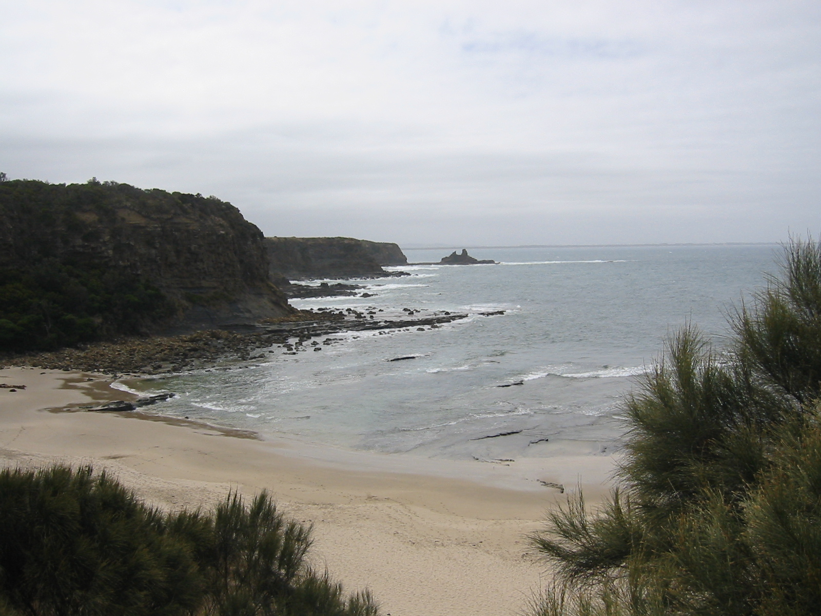 Blick auf die Küste